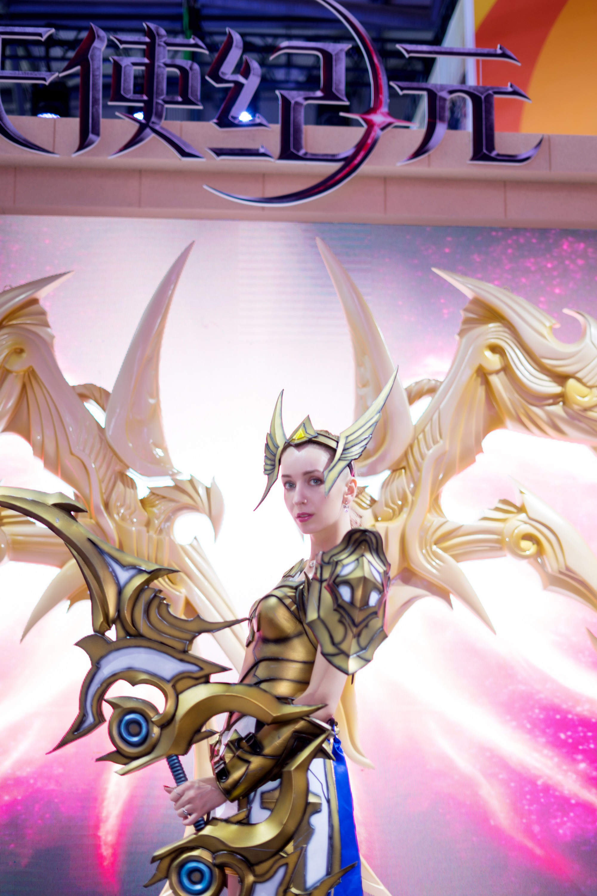 2018Chinajoy Cj打酱油走一圈